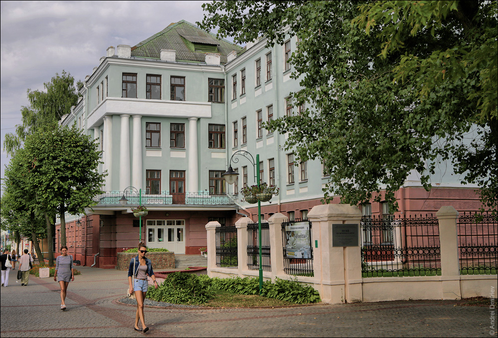 Магілёўскія відарысы